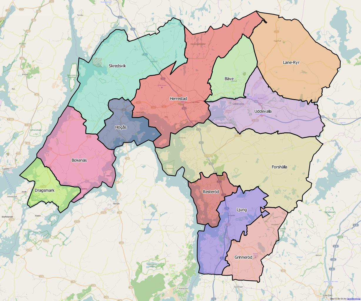 Distriktsindelningen i Uddevalla kommun World file: 69.62255967524401967 0 0 -69.62255967524401967 1272527.0568330402020365 8065561.2157493531703949